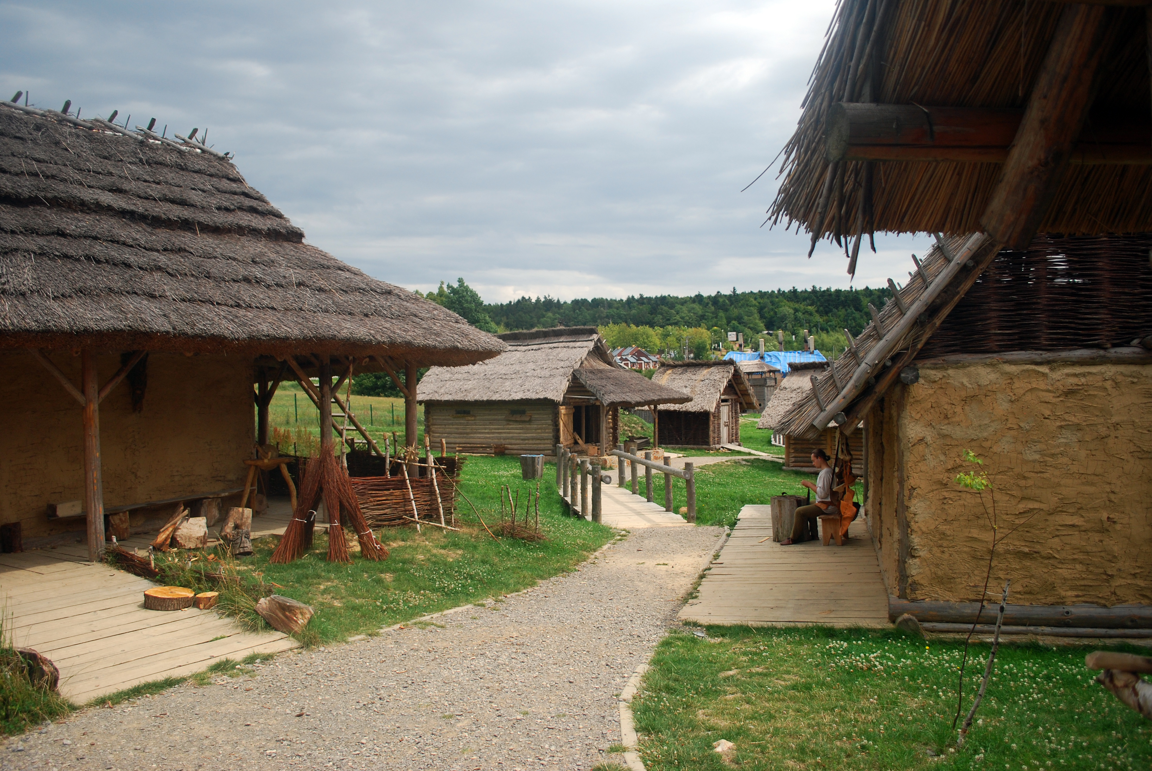 Osada Średniowieczna w Hucie Szklanej.